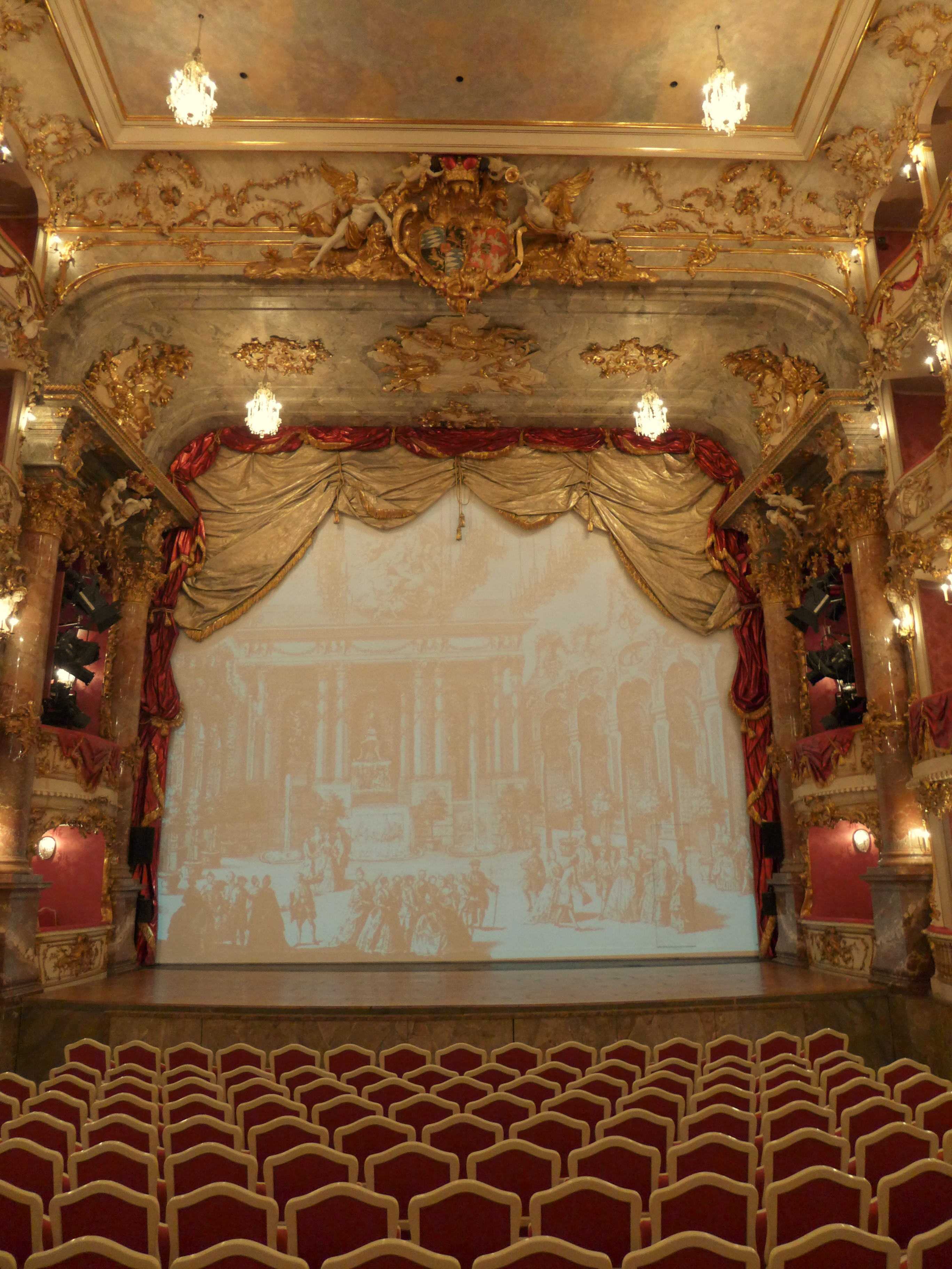 Cuvilliés-Theater, Blick zur Bühne